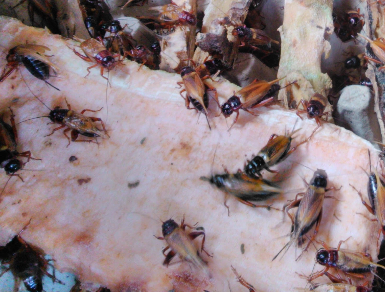 Jangkrik Ternak